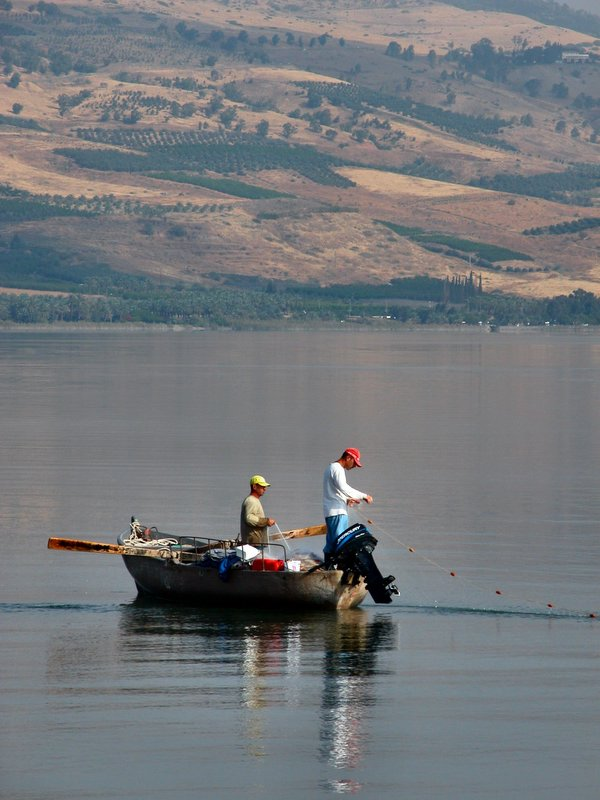 דייג בכנרת